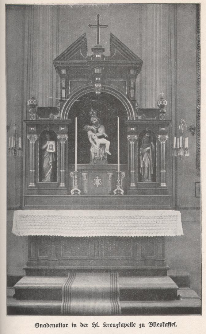 Altar mit Pfeilemadonna in der Hl-Kreuz-Kapelle Blieskastel, 1914; Altar stammt ursprünglich aus der Benediktinerabtei Wiblingen